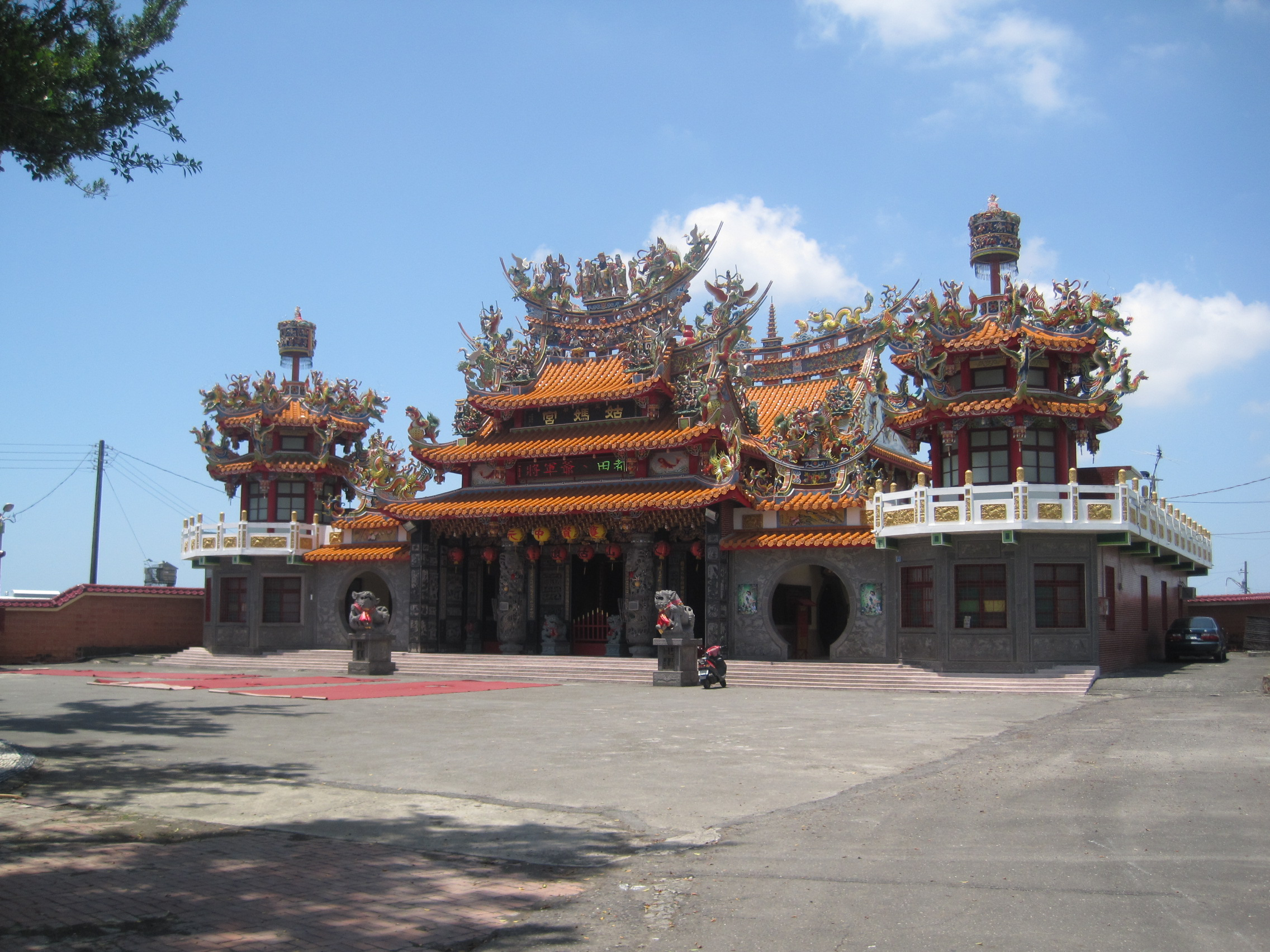 八份姑媽宮